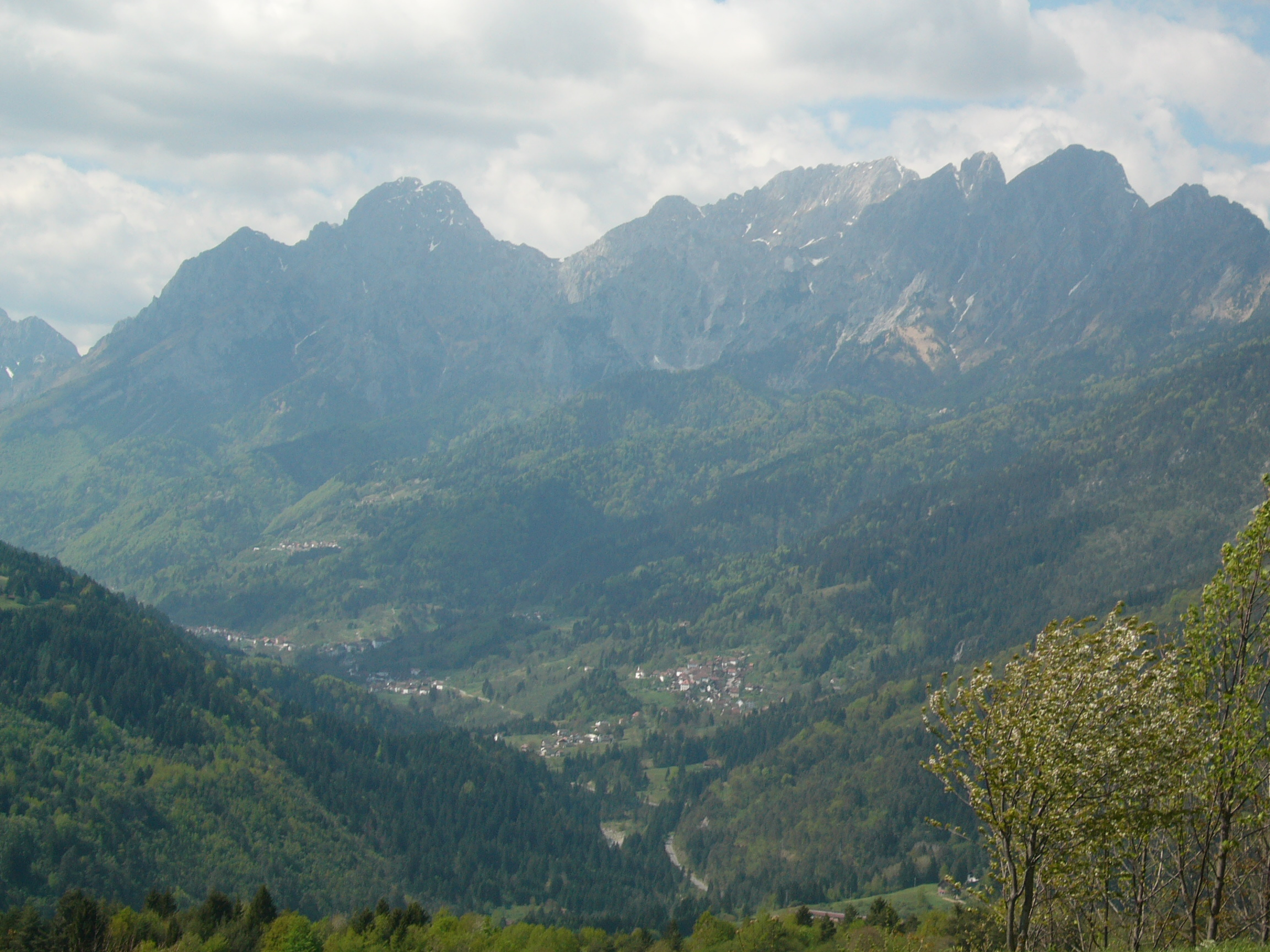 La Val Pesarina vista da Clavais Foto scattata da Utente:Alpino friulano